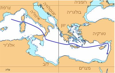 אוניית המעפילים עליה - מסלול